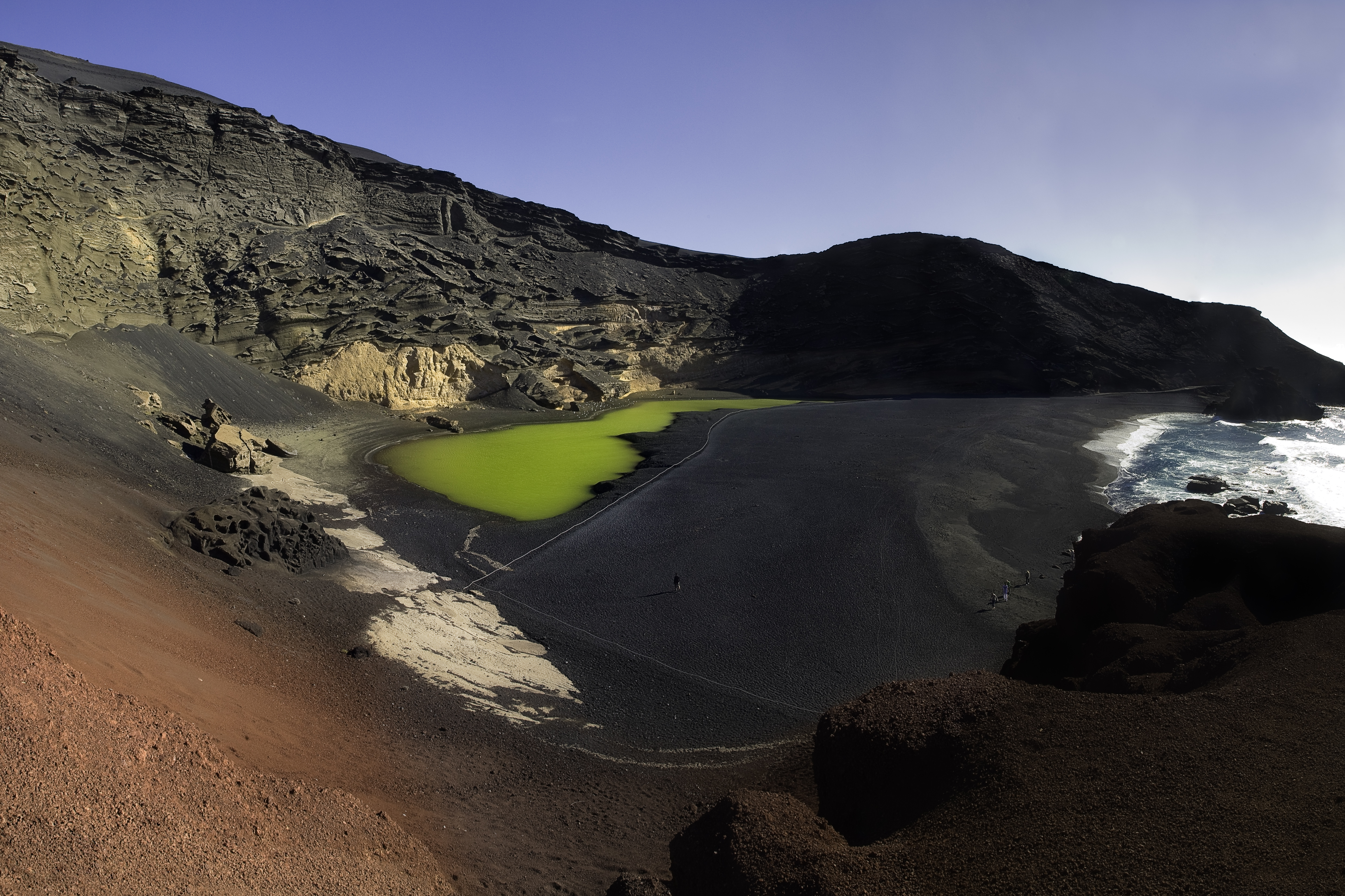 Crater and Laguna of El Golfo, Lanzarote